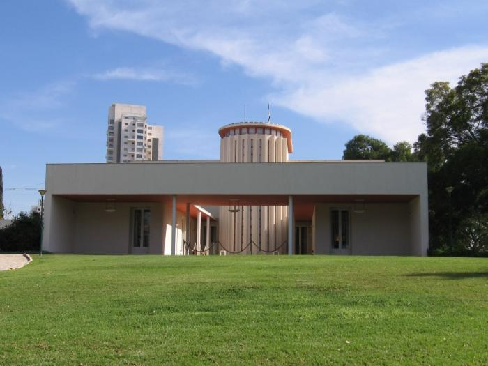 Designed by Erich Mendelsohn. 1937.